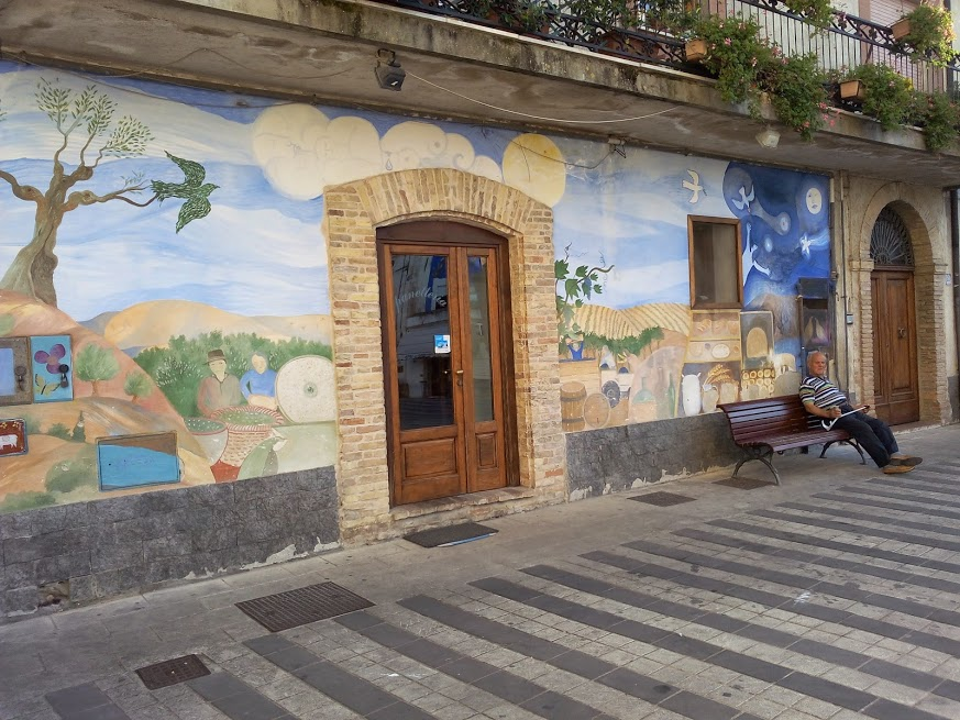 Gita a Treglio del 13 Agosto 2014 Murales